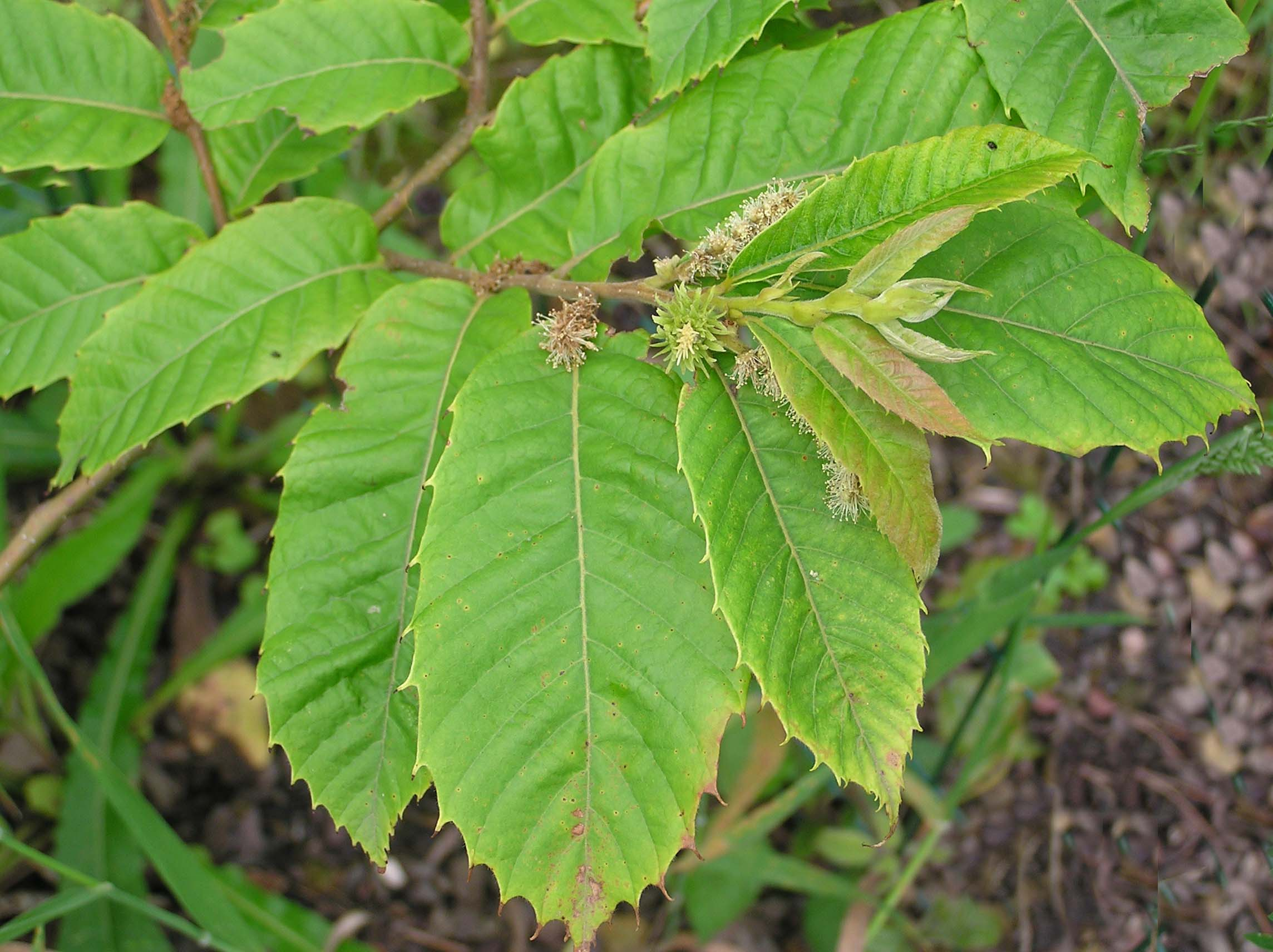 Castanea seguinii. Foto tomada en el Jardín Botánico de Iturraran.